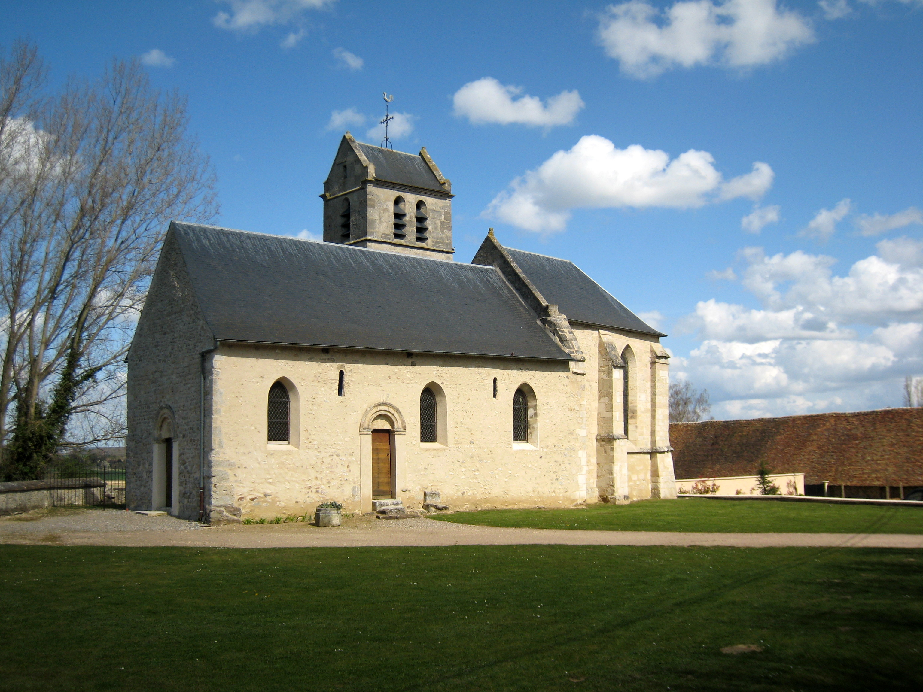 Eglise de Monts, Oise, France